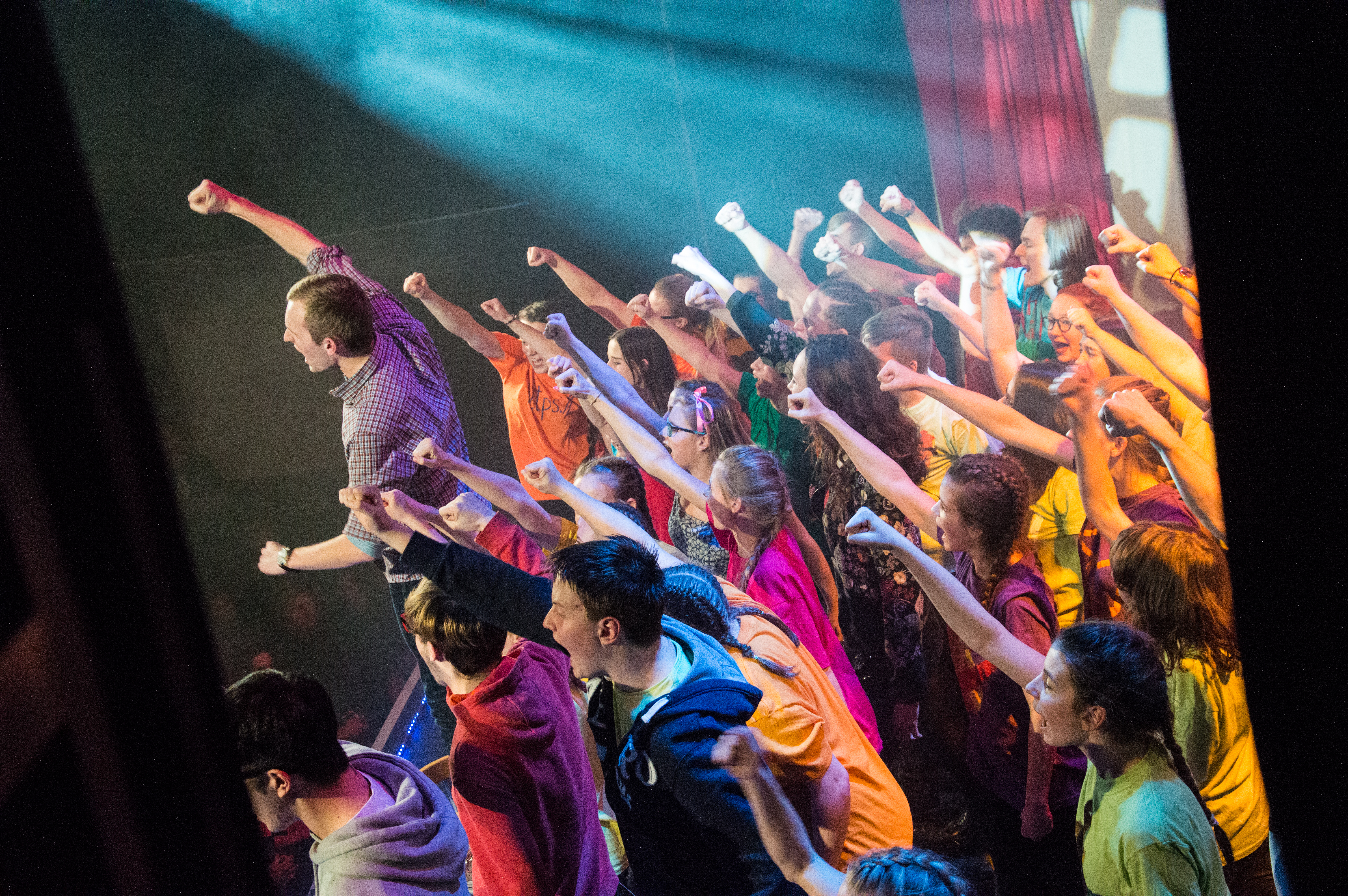 Muzikál Židle v kruhu – s rebelem v čele ovládli studenti školu.